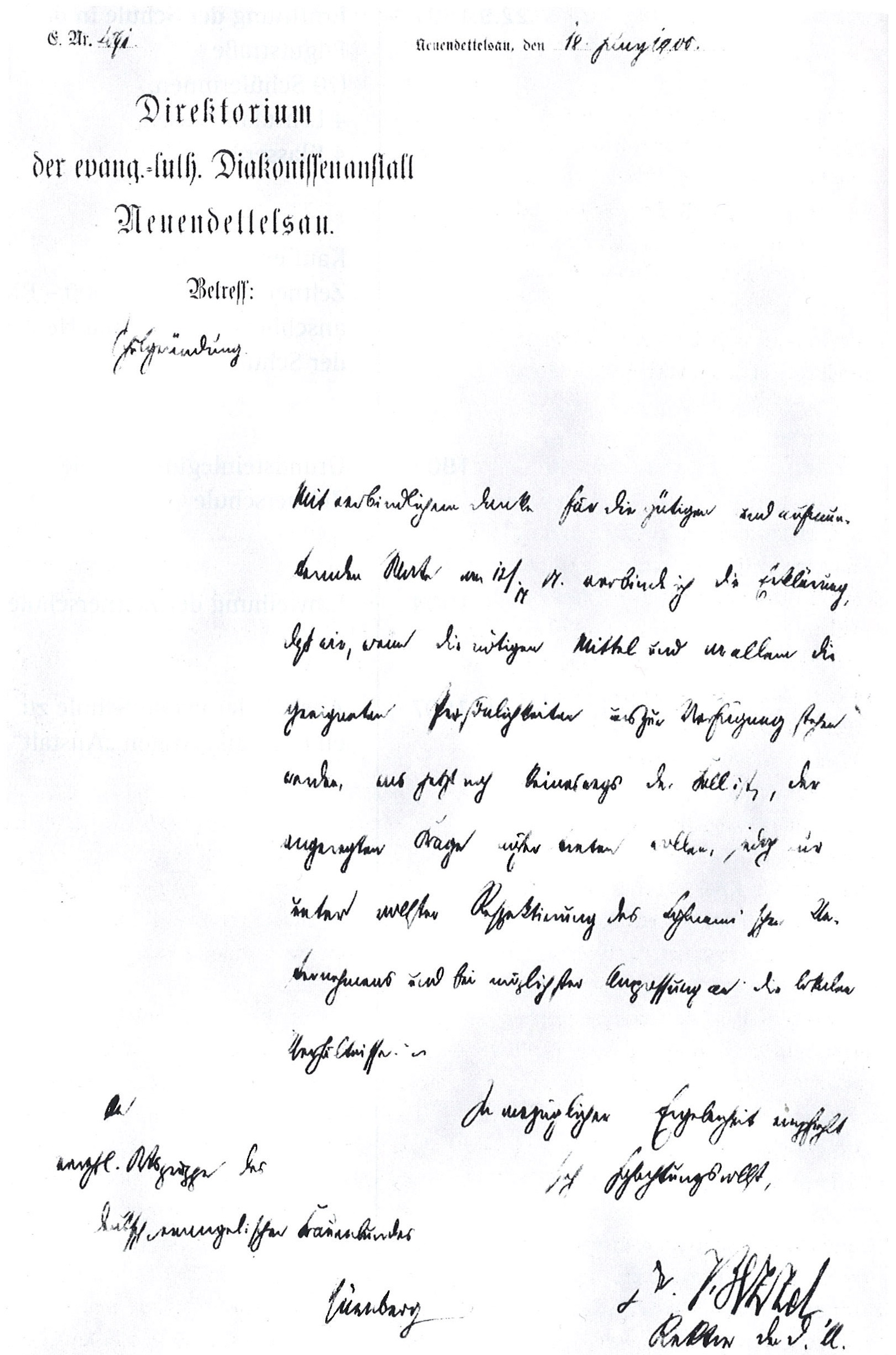 Brief von Herrman Brezzel zur Gründung der Schule